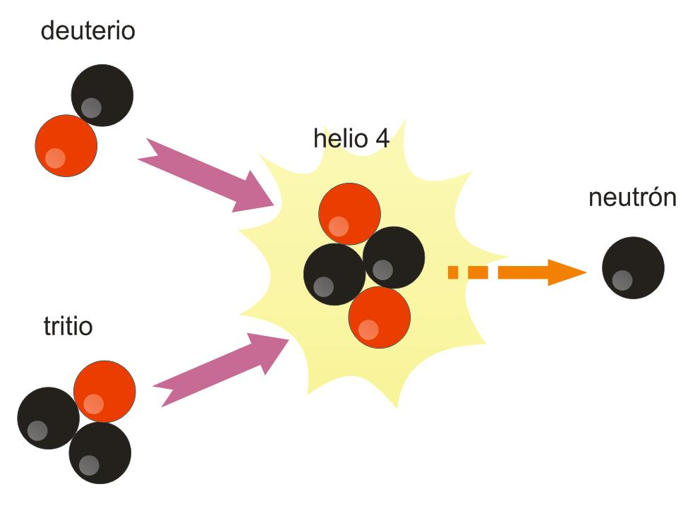 Fusión del hidrógeno pesado (deuterio) y del tritio, utilizado en las bombas nucleares